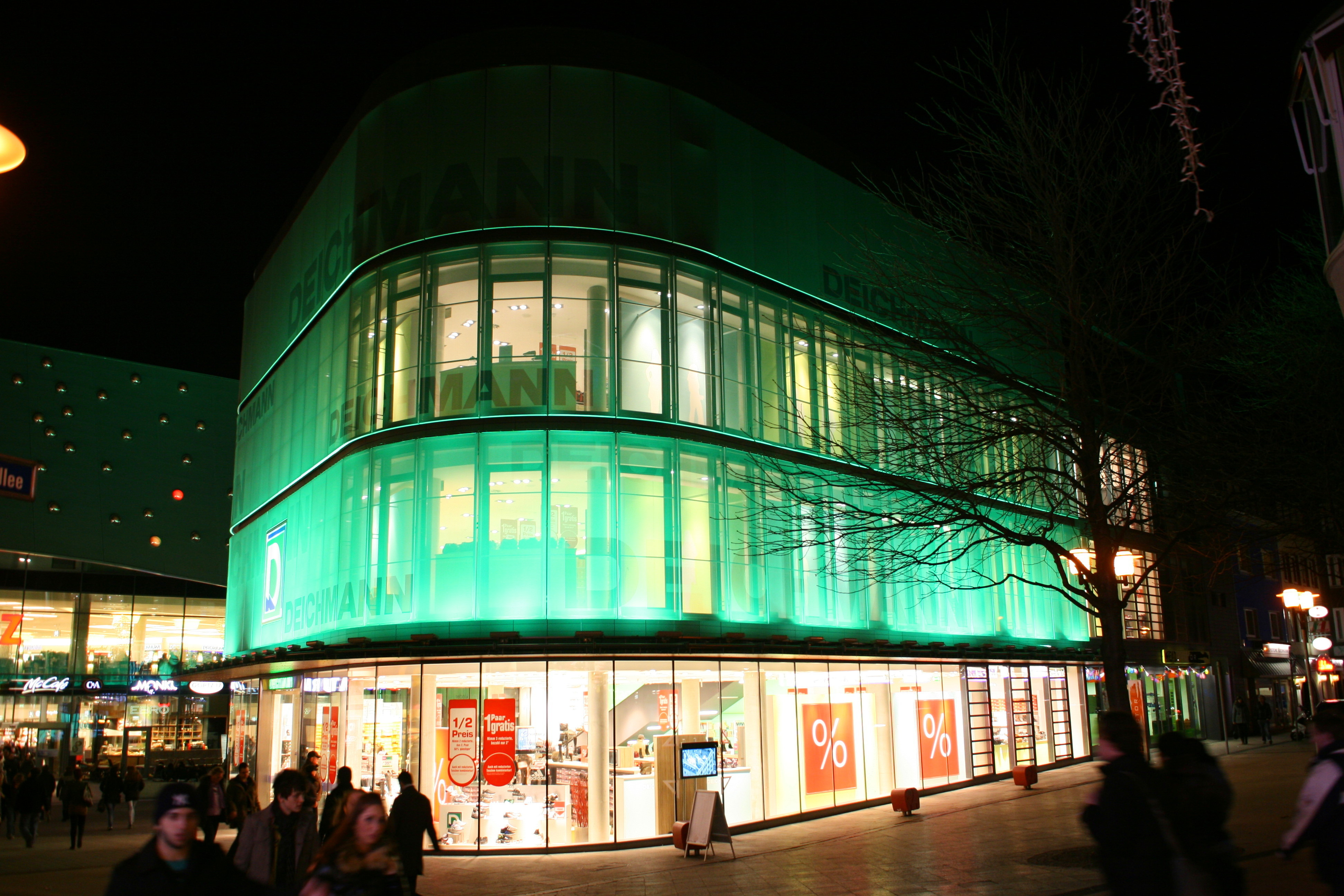 Limbecker Straße in Essen